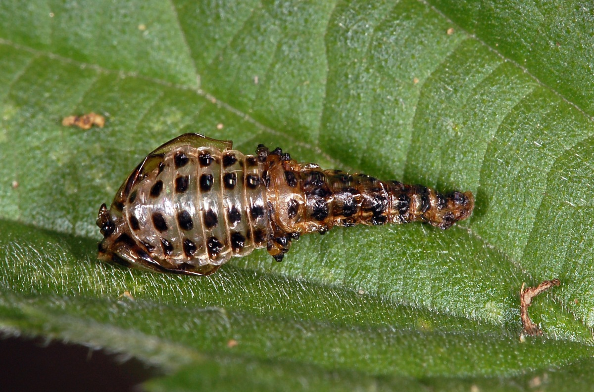 Gefleckter Weidenblattkäfer (Chrysomela vigintipunctata), Knüllwald, Hessen, Deutschland